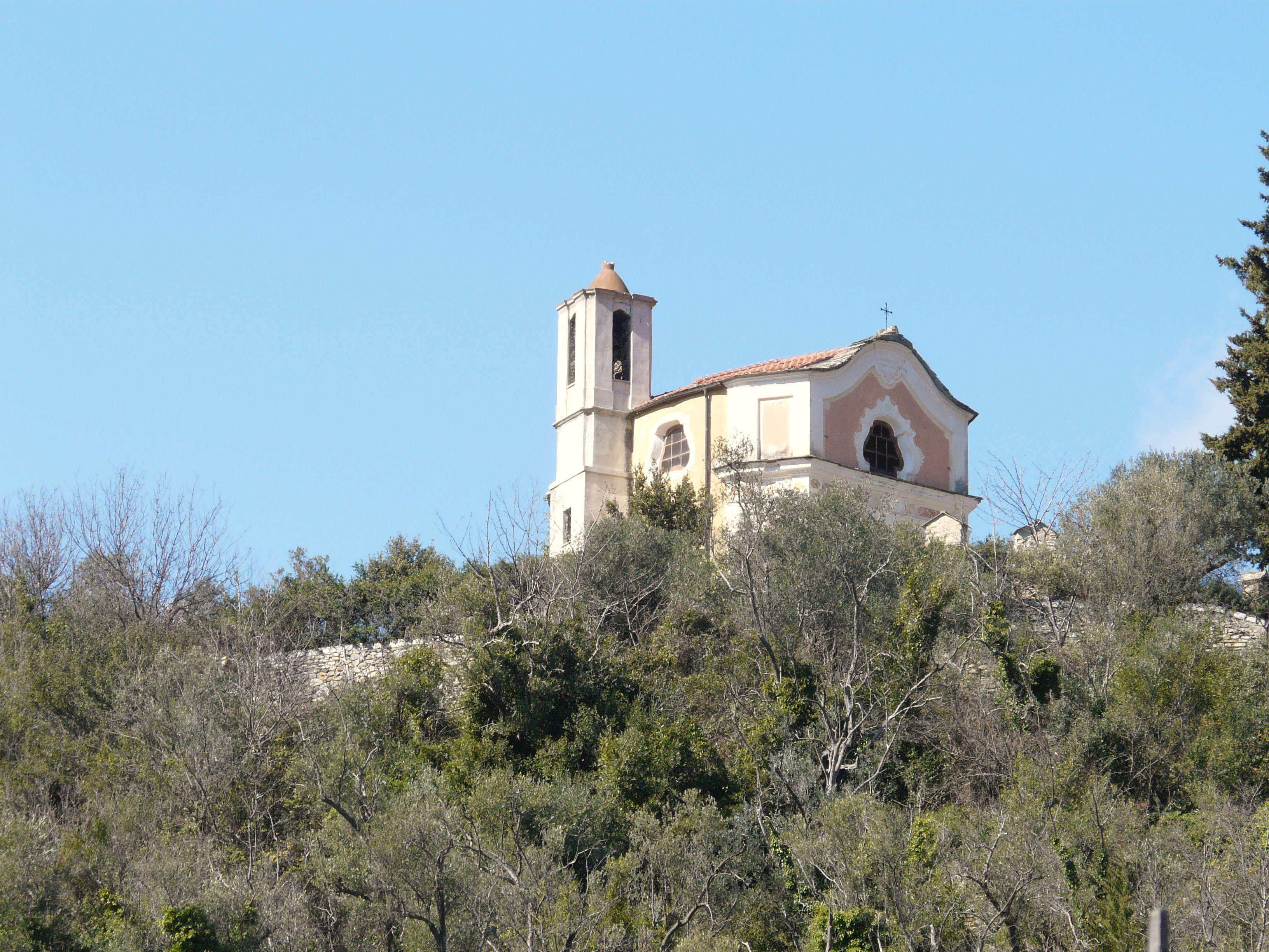 Chiesa di San Giovanni Battista, Ortovero, Liguria, Italia